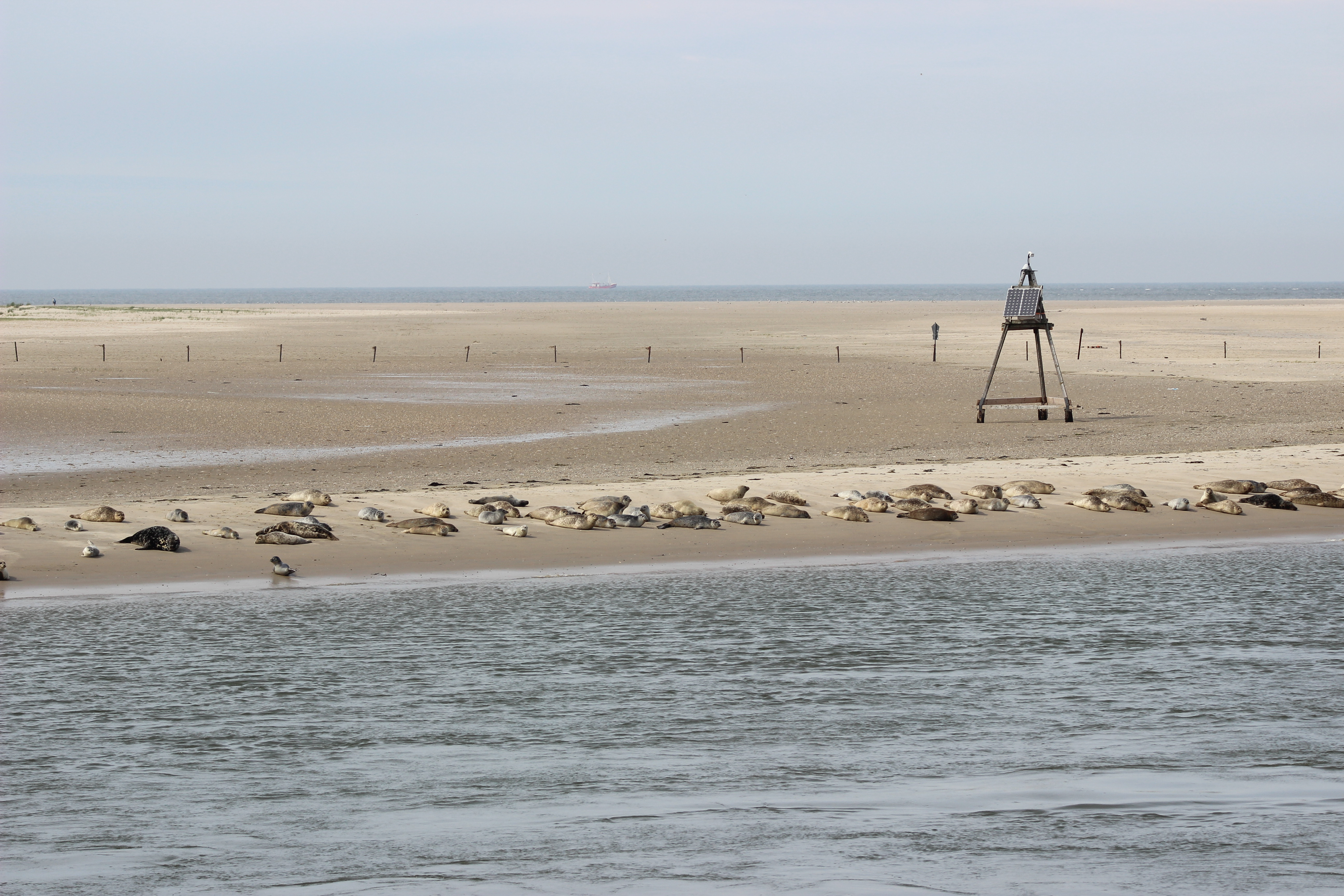 Kolonie vor Norderney